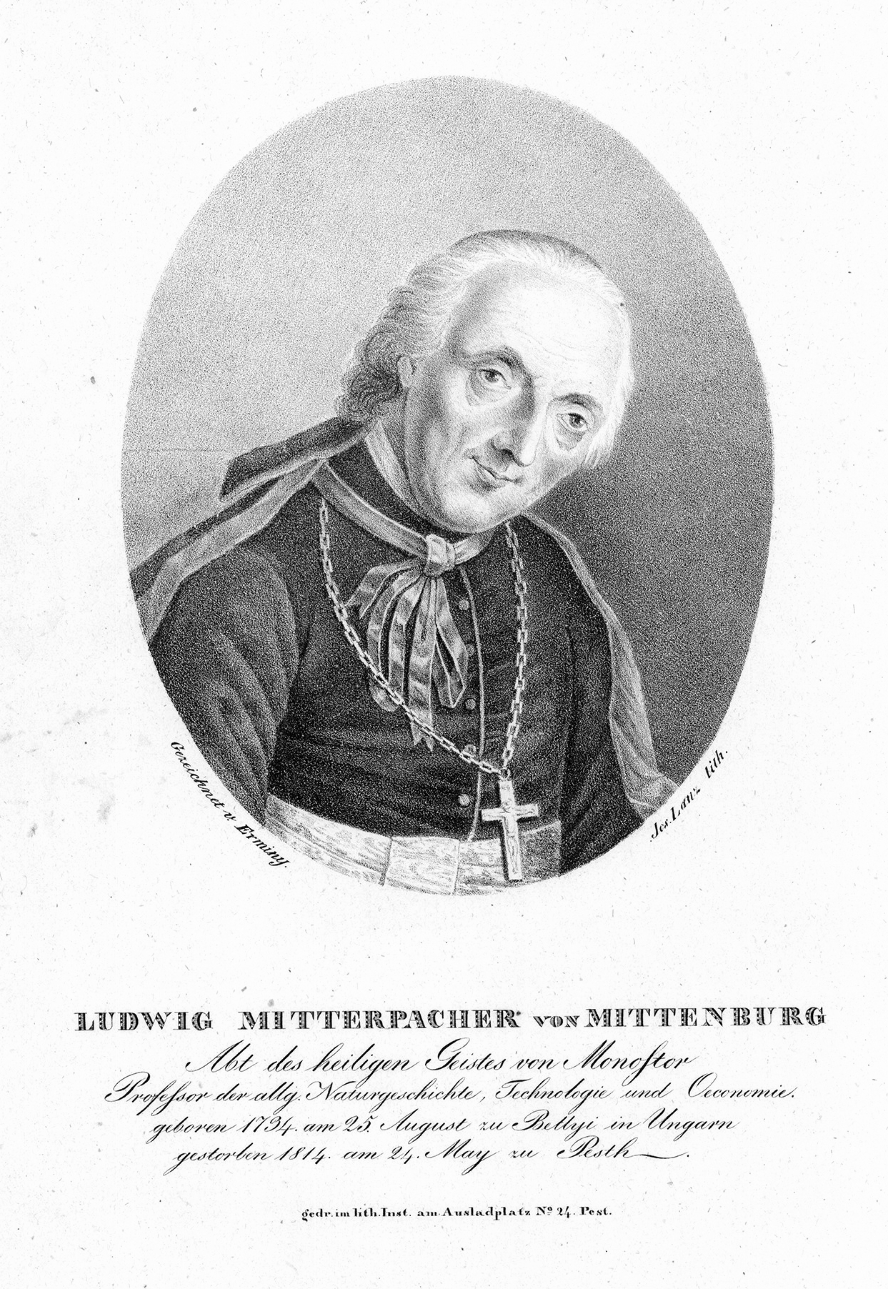 Mitterpacher Lajos (eredetileg Mitterbacher), mitternburgi (Bellye, 1739. február 14. – Pest, 1788. március 24.) matematikus, bölcseleti és teológiai doktor, egyetemi tanár